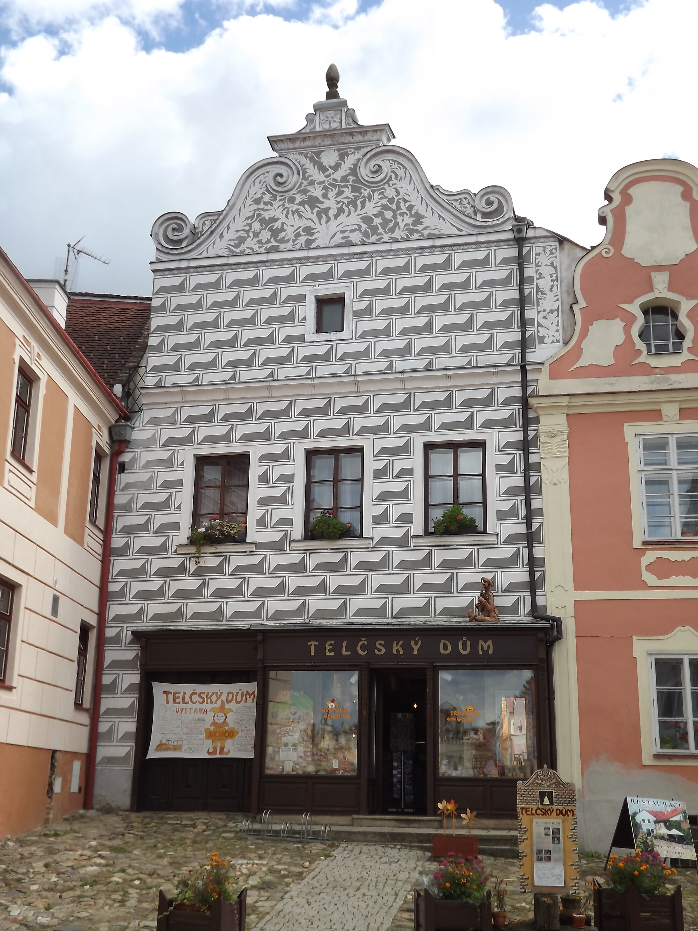 Měšťanský dům (Telč), nám. Zachariáše z Hradce 31, Telč